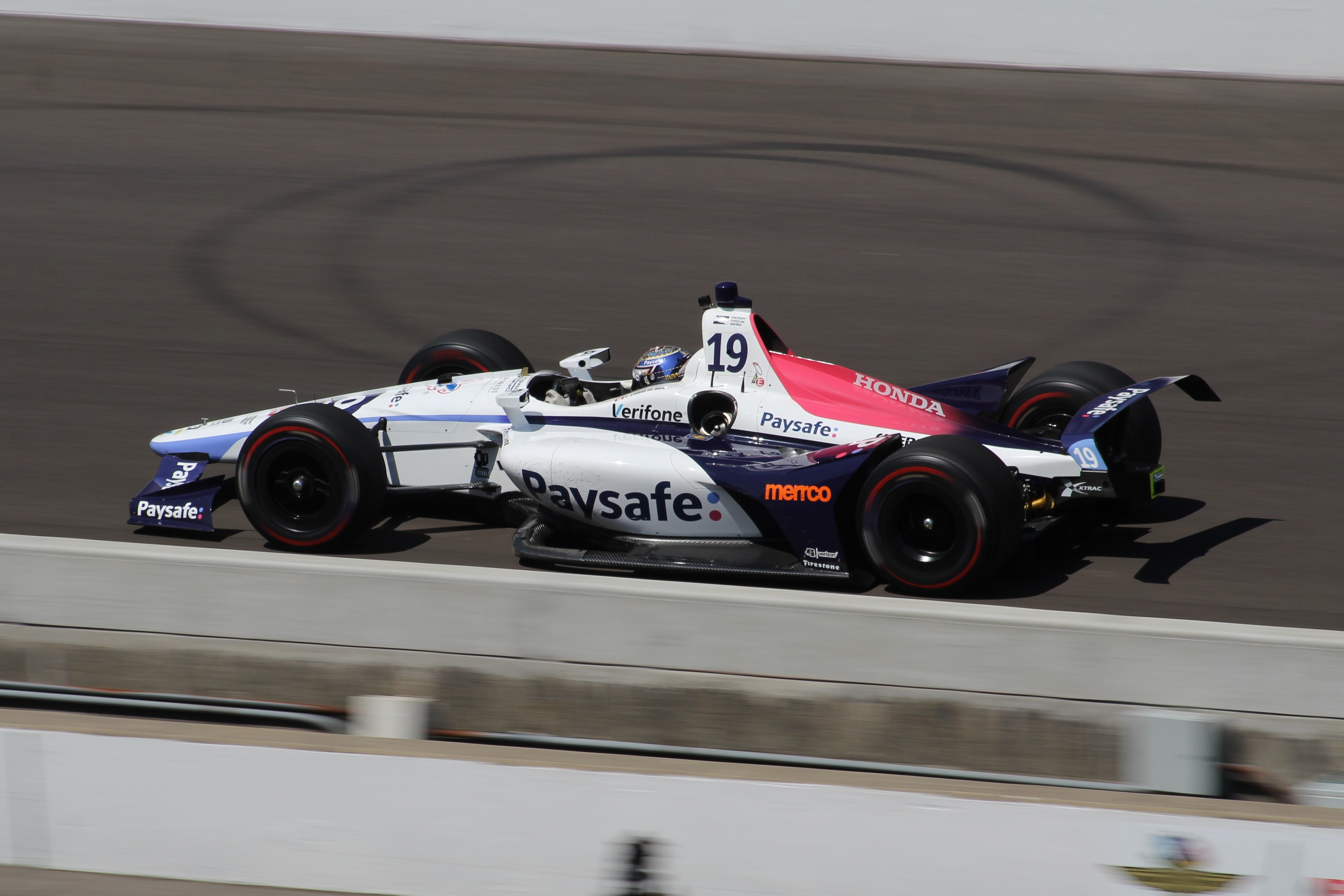 2018 Indianapolis 500